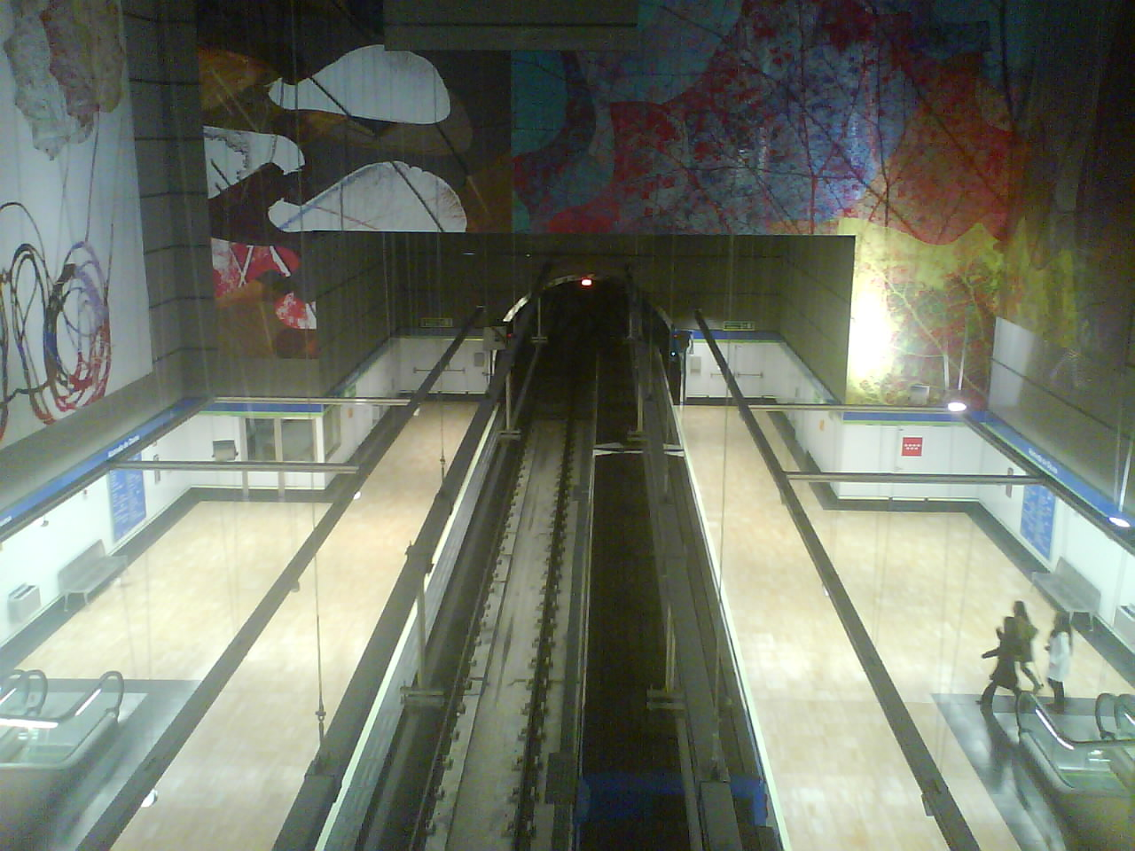 Estación de Alameda de Osuna (Linea 5).